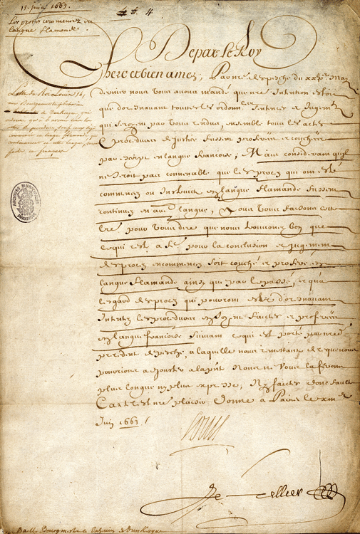 Lettre envoyée par LOUIS XIV à la ville de Dunkerque pour l'emploi de la langue française.